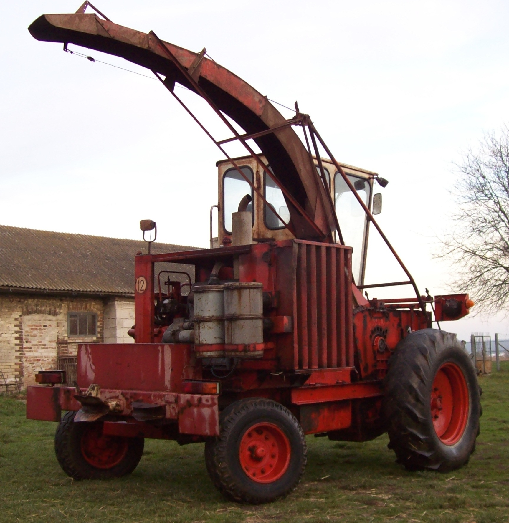 Sieczkarnia Z320 - widok z tyłu (2)